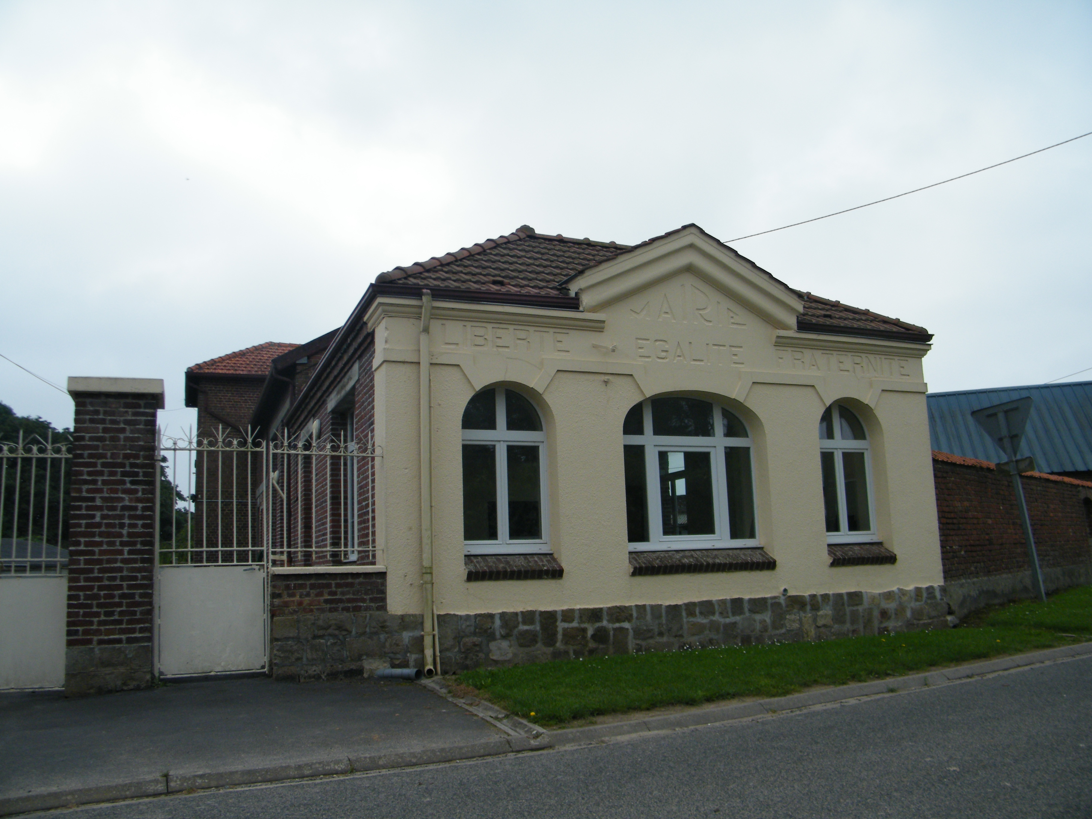 Mairie-école.